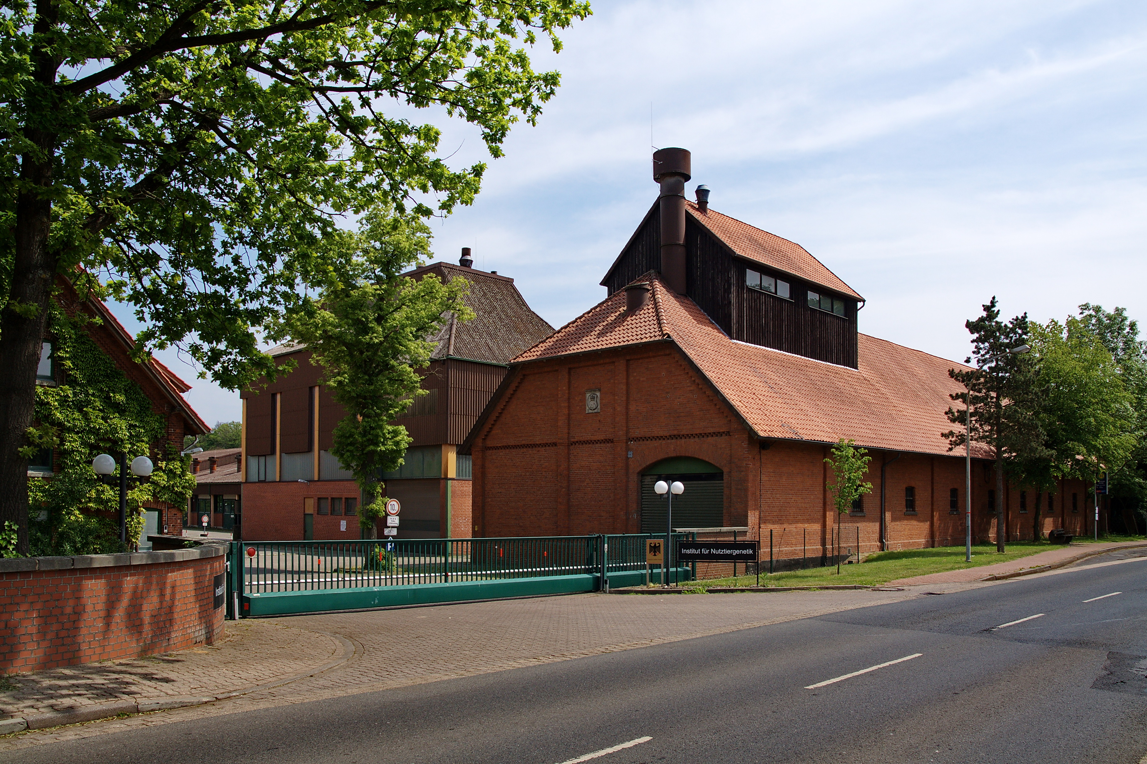 Institut für Nutztiergenetik in Mariensee (Neustadt am Rübenberge), Niedersachsen, Deutschland